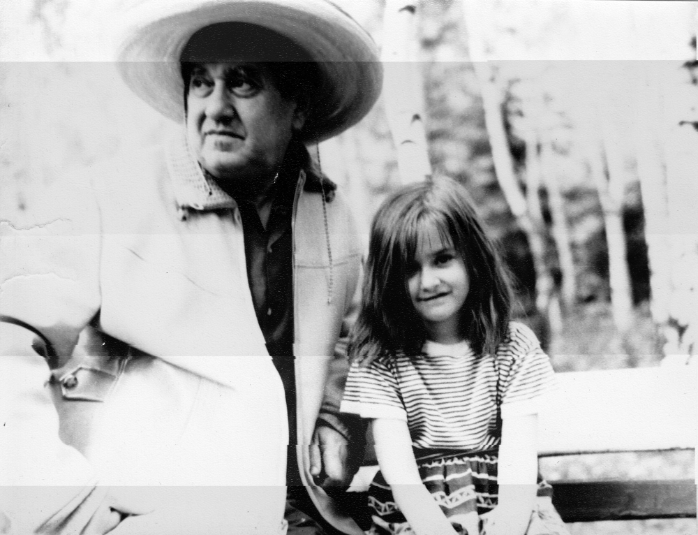 ויקטור דרגונסקי וקסניה, בתו. 1971